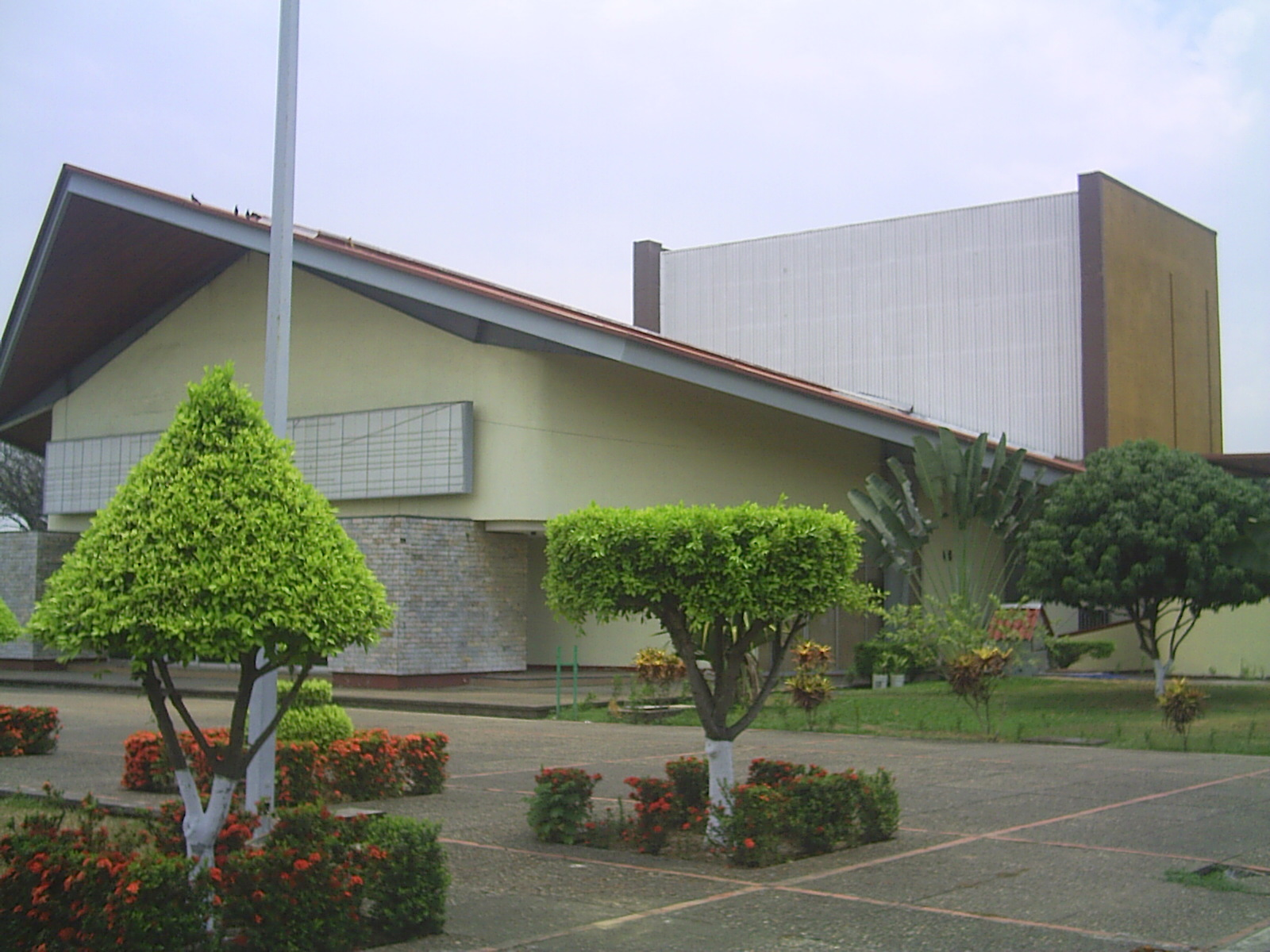 Es el auditorio de la Casa de la Cultura Victor Bravo Ahuja de la Ciudad de Tuxtepec, Oax.